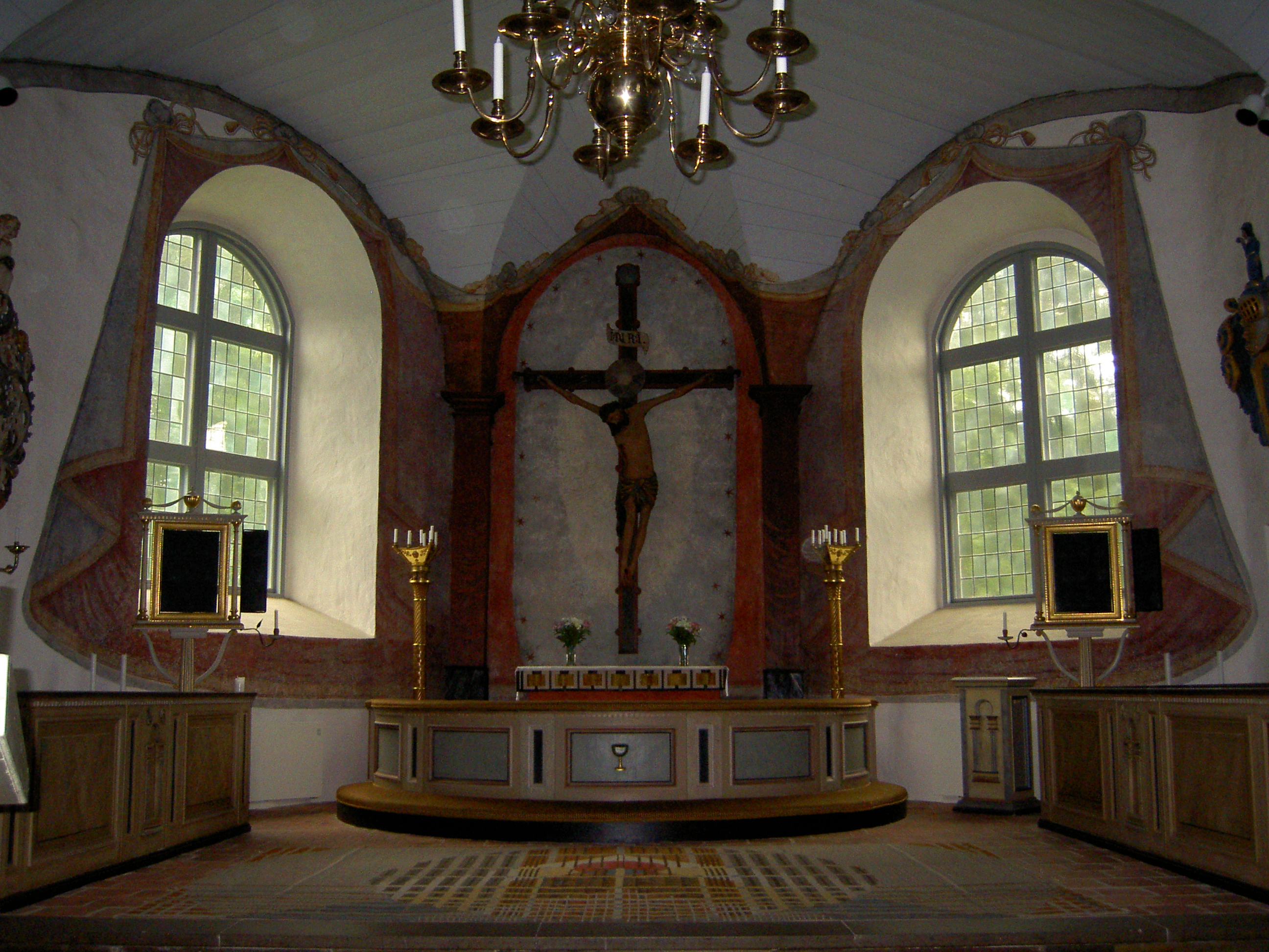 Kor och altare i Norra Fågelås kyrka